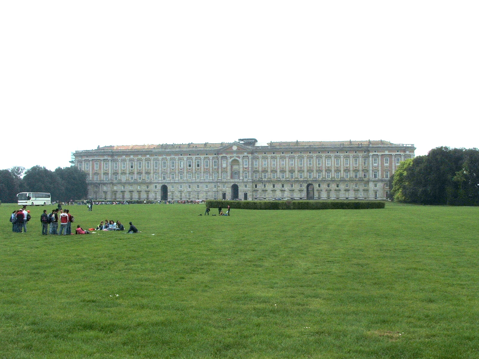 Reggia di Caserta, Caserta, Campania, Italia. Il prospetto posteriore che si affaccia sul parco della Reggia